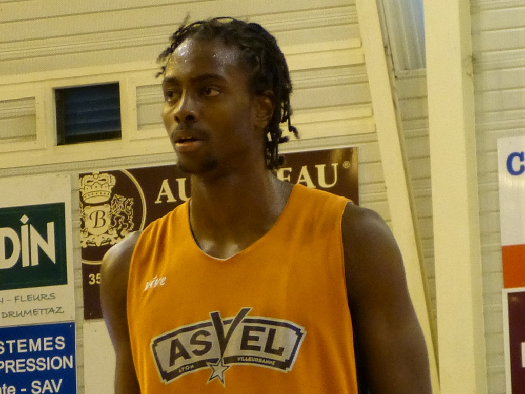 Livio Jean-Charles lors du match JDA Dijon - ASVEL, match de préparation au tournoi des Champions 2012 d'Aix-Maurienne.